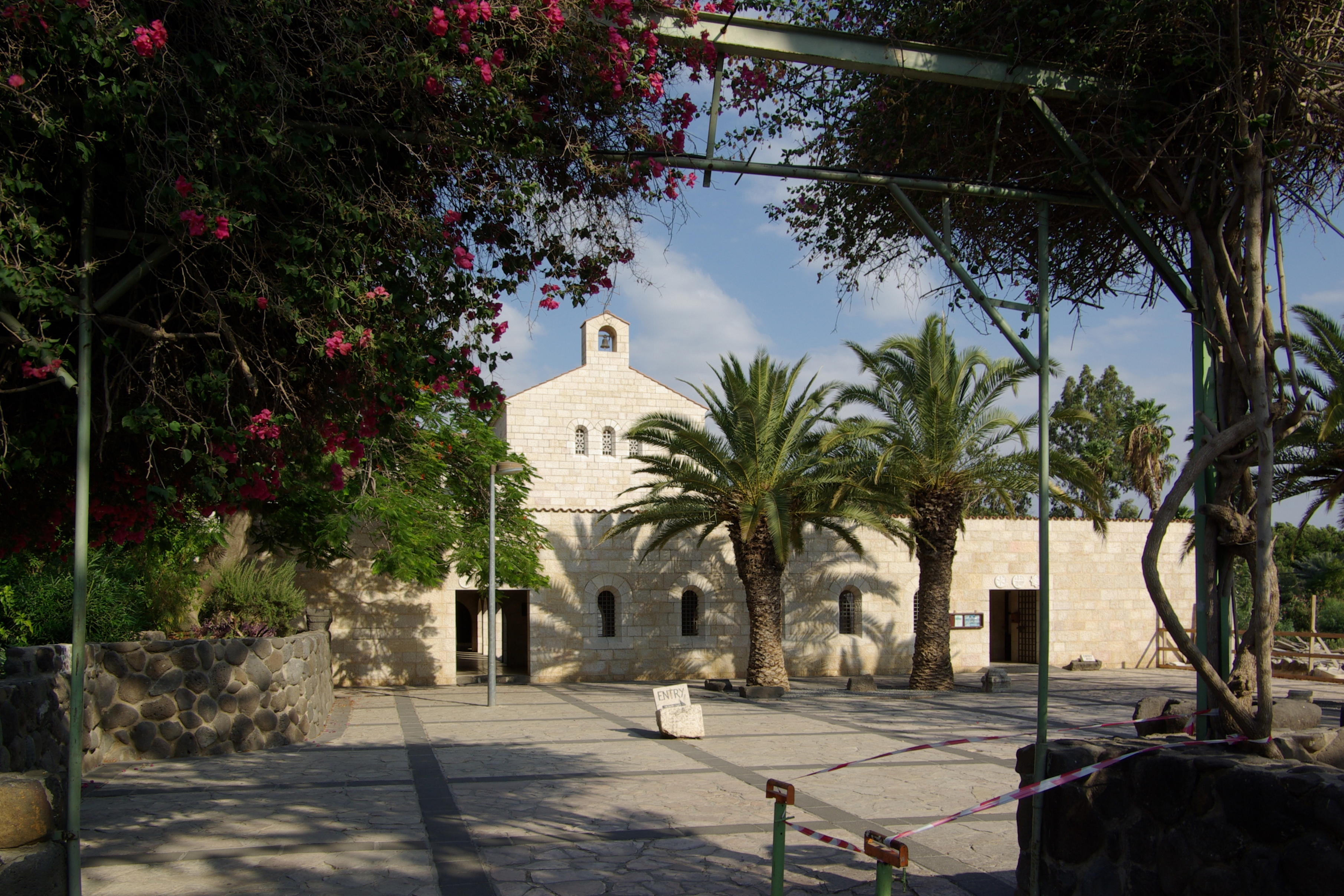 Brotvermehrungskirche